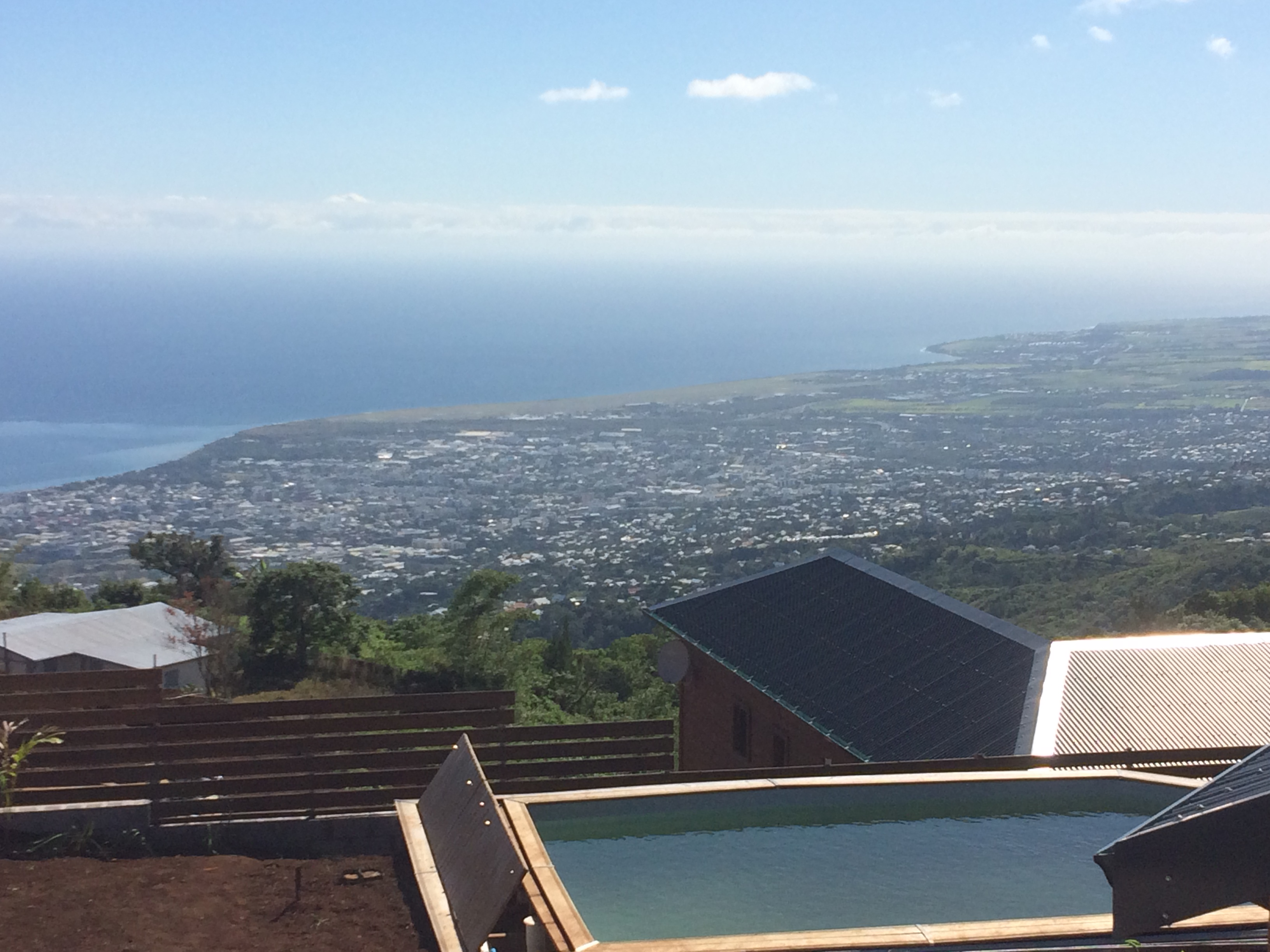 La ville de St-Denis, capitale de l'île de la Réunion.